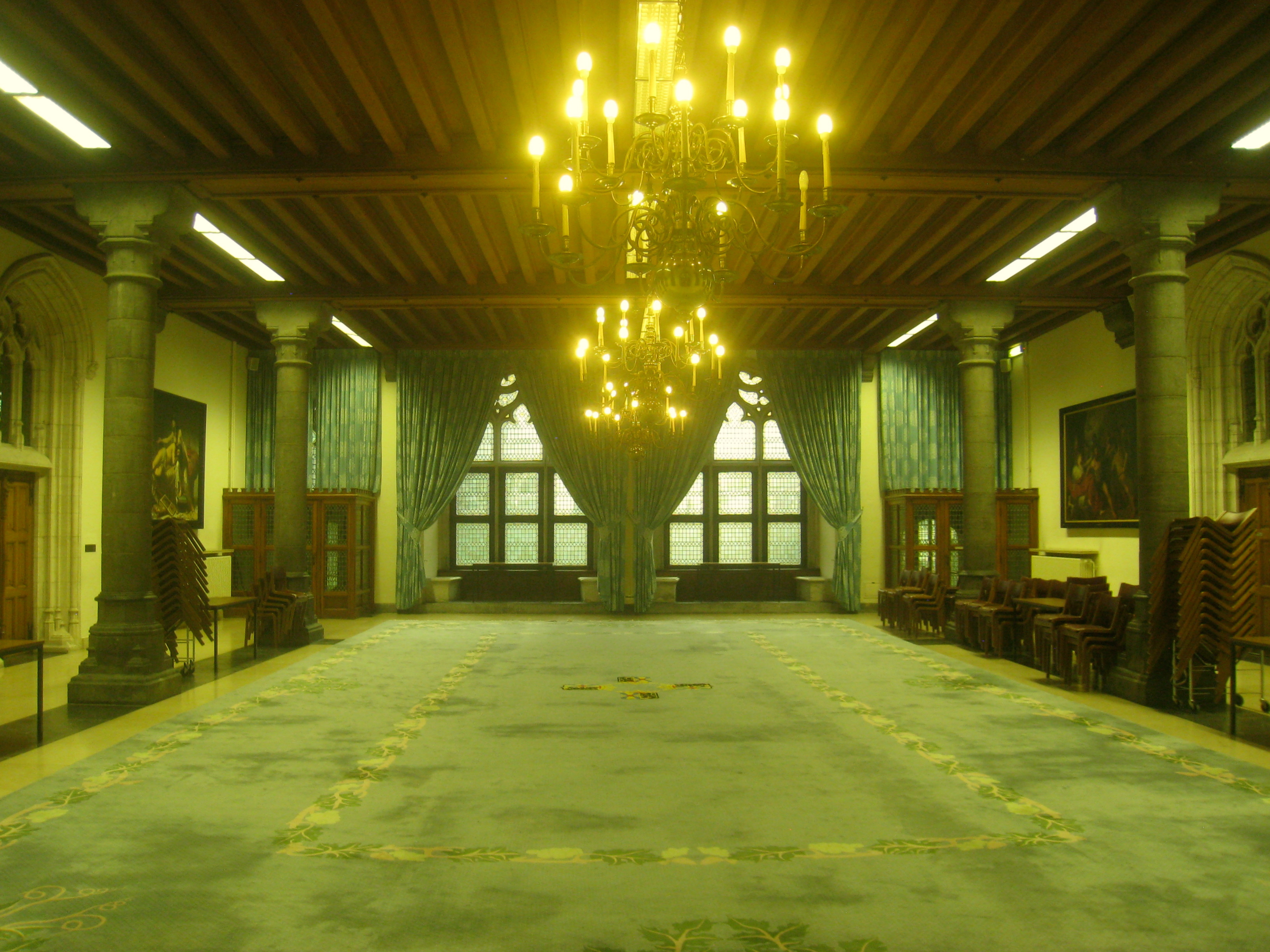 Provinciaal Hof, Brugge / Bruges, Belgium.